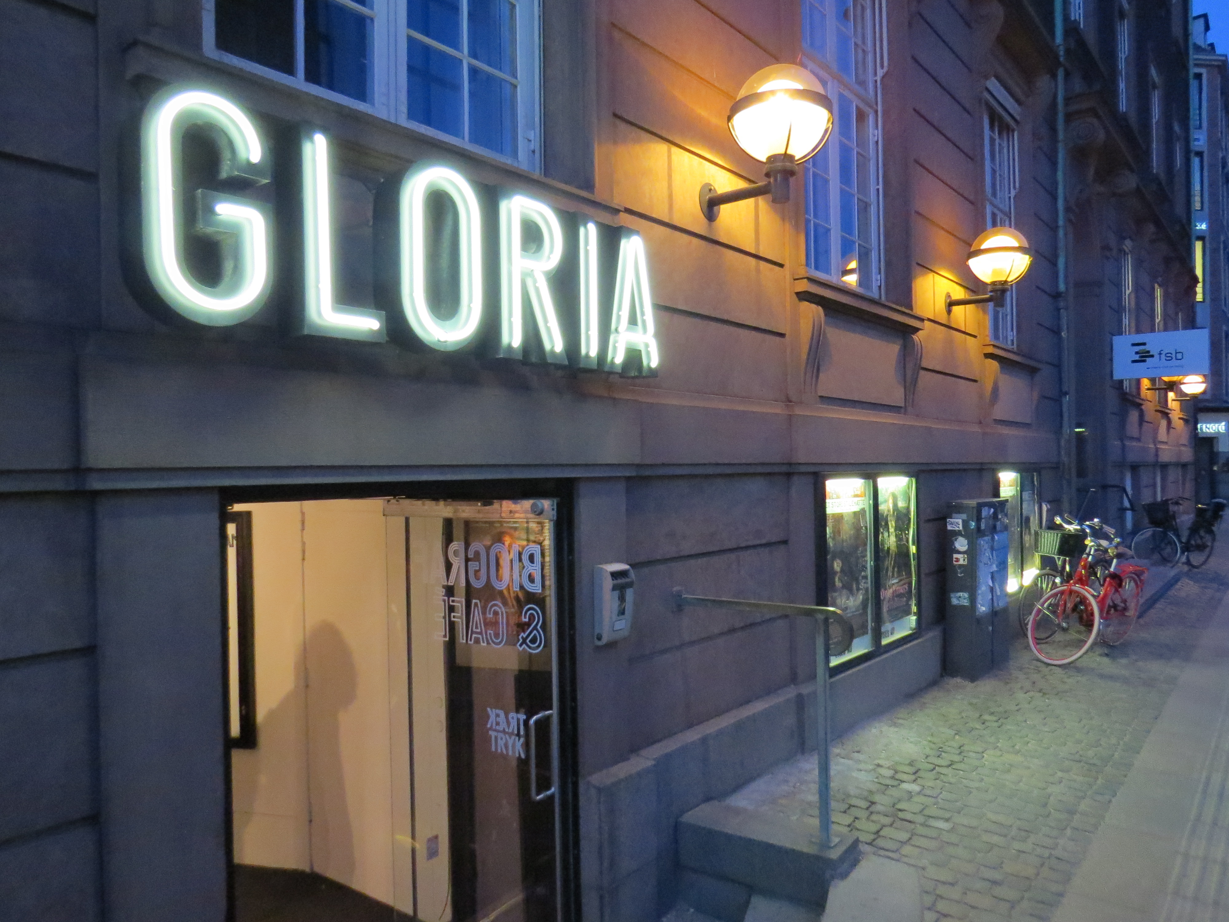 Biograf Gloria, København